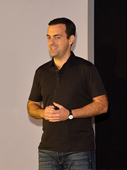 Informático brasileño